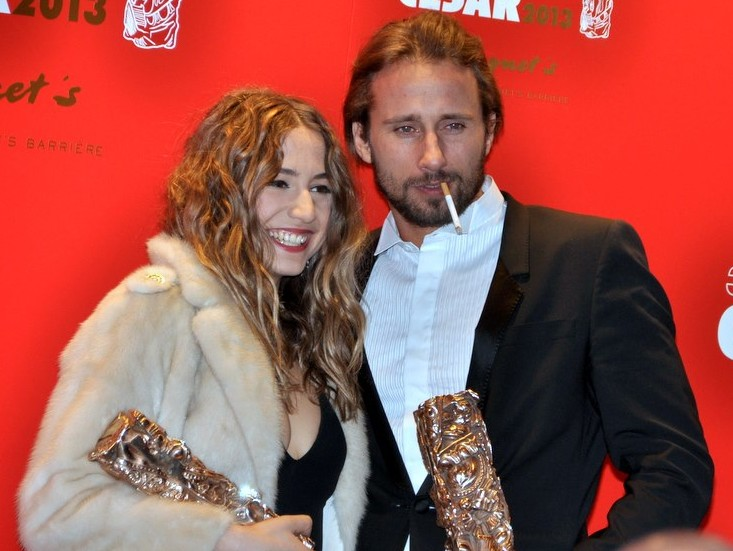 Izia Higelin et Matthias Schoenarts à la cérémonie des César